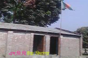 এস ডি বি উচ্চ বিদ্যালয়